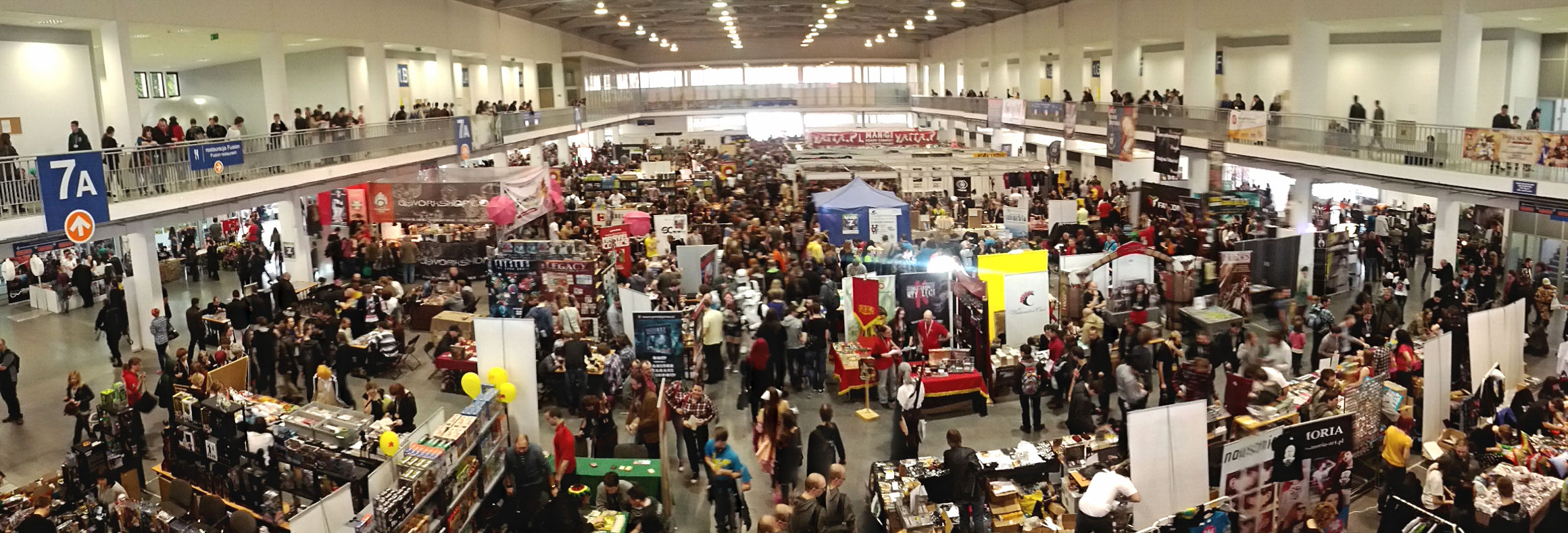 Panorama Festiwalu Fantastyki Pyrkon 2014